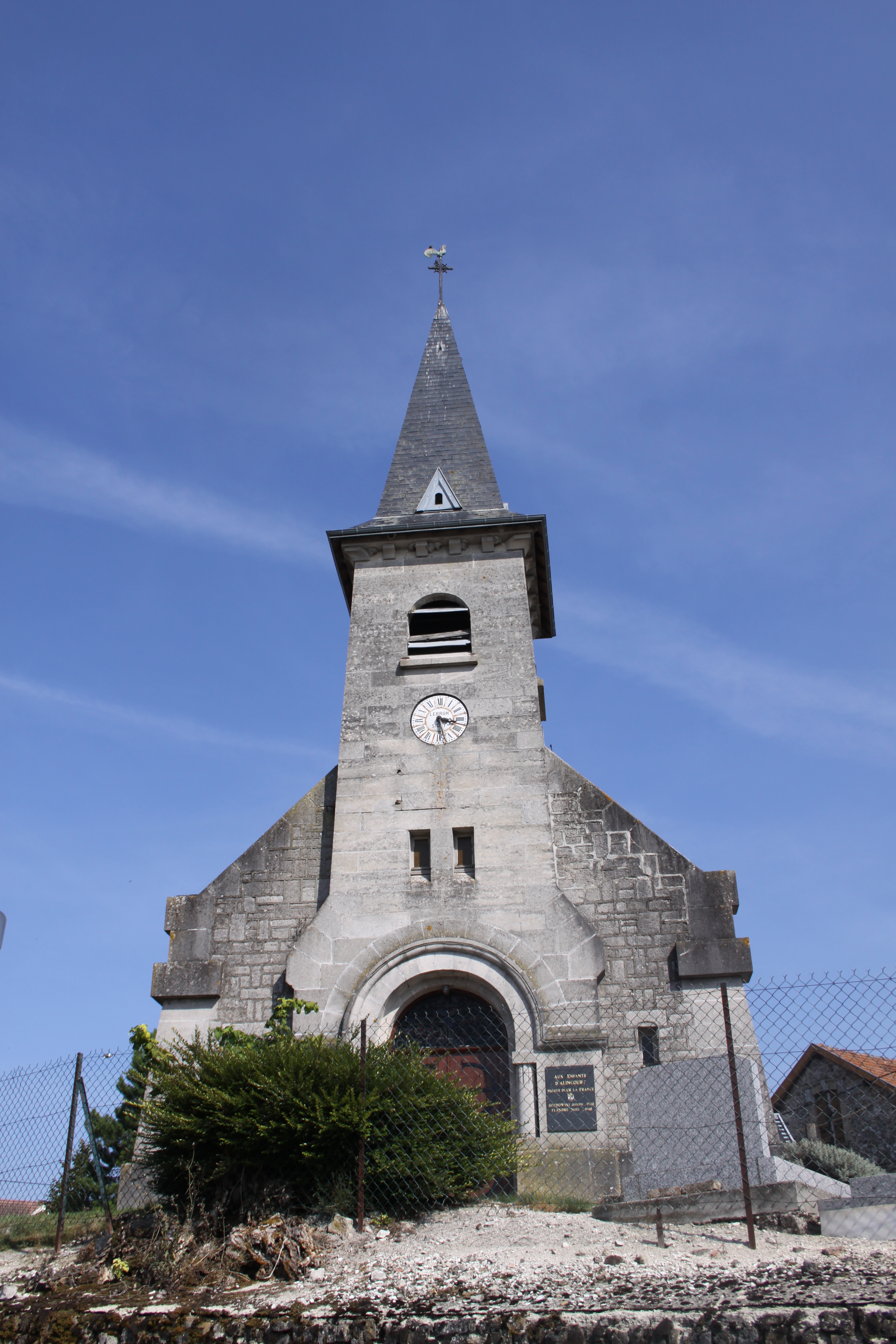 Village Ardennais